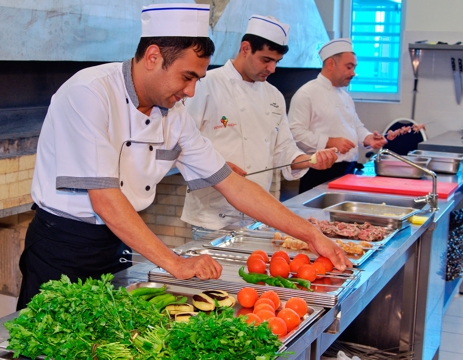 Приготовление шашлыка в Бута Паласе (Баку)